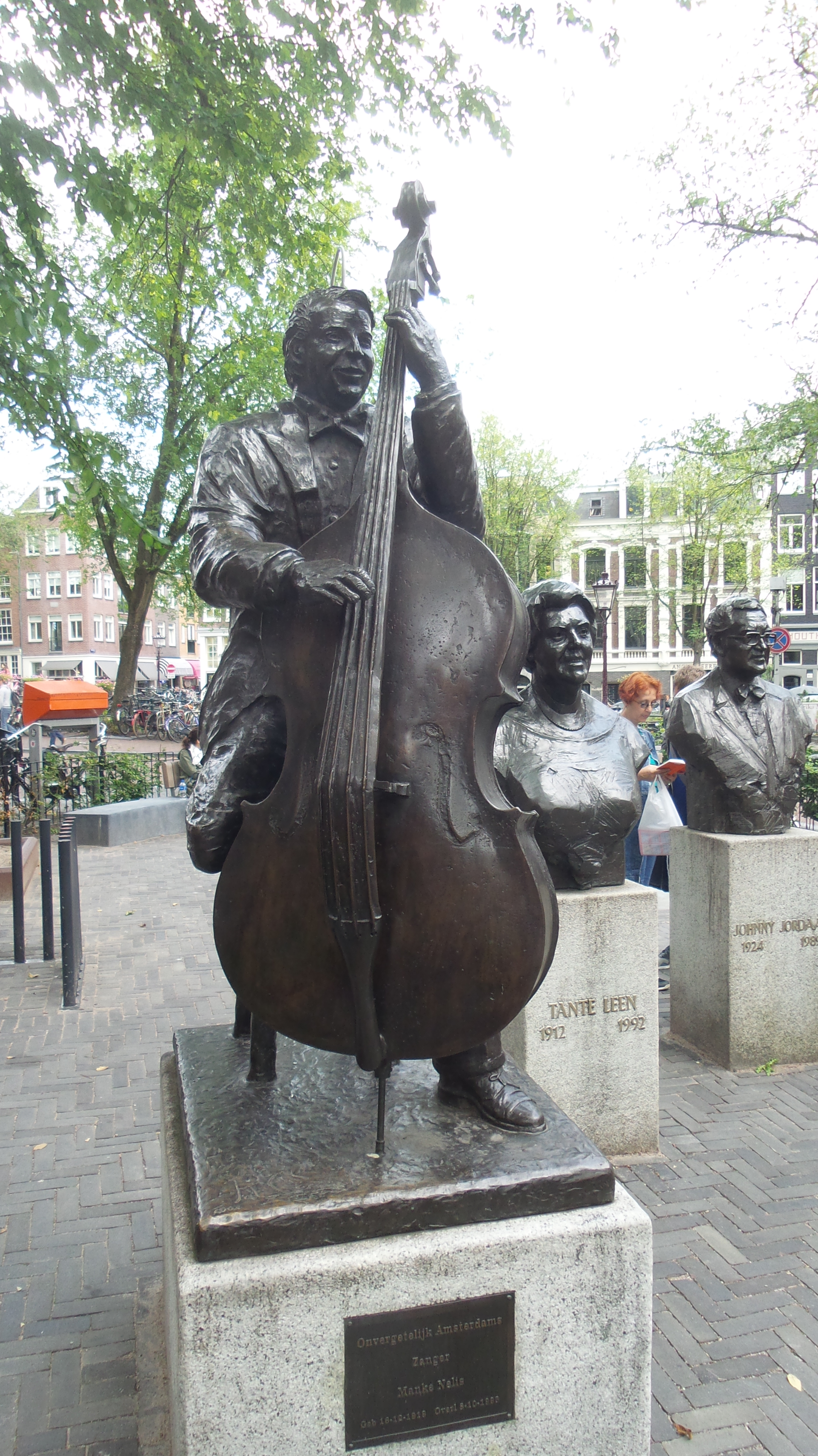 Manke Nelis, pseudoniem van Cornelis Pieters (1919 - 1993)zanger van het levenslied en bassist. Op 30 oktober 2005 werd een standbeeld onthuld op het Johnny Jordaanplein In Amsterdam.